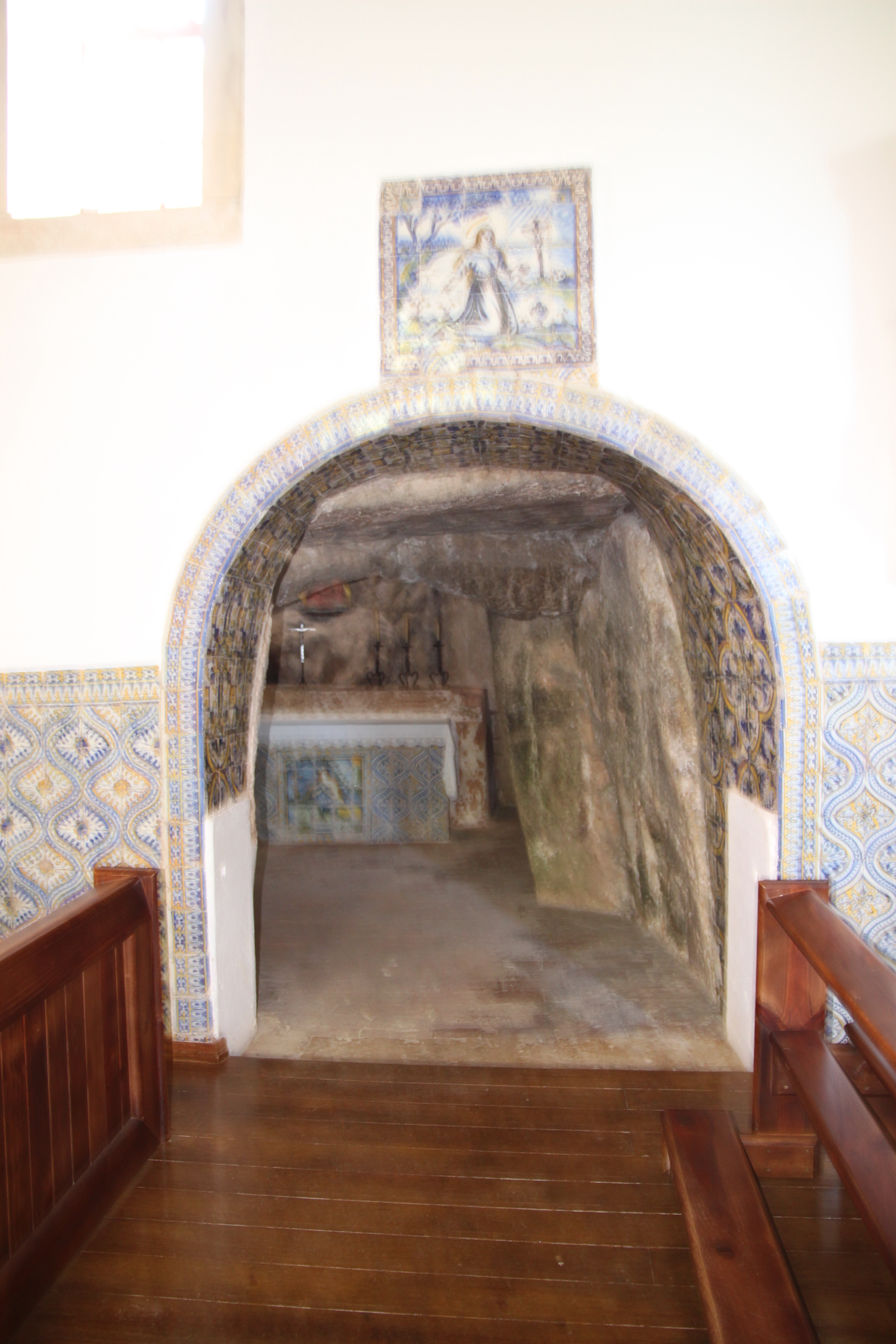 Igreja de Santa Maria Madalena ou Igreja Paroquial de Alcobertas, e megálito-capela adjacente This file was uploaded for Wiki Loves Monuments in Portugal with the unique identifier 72743.